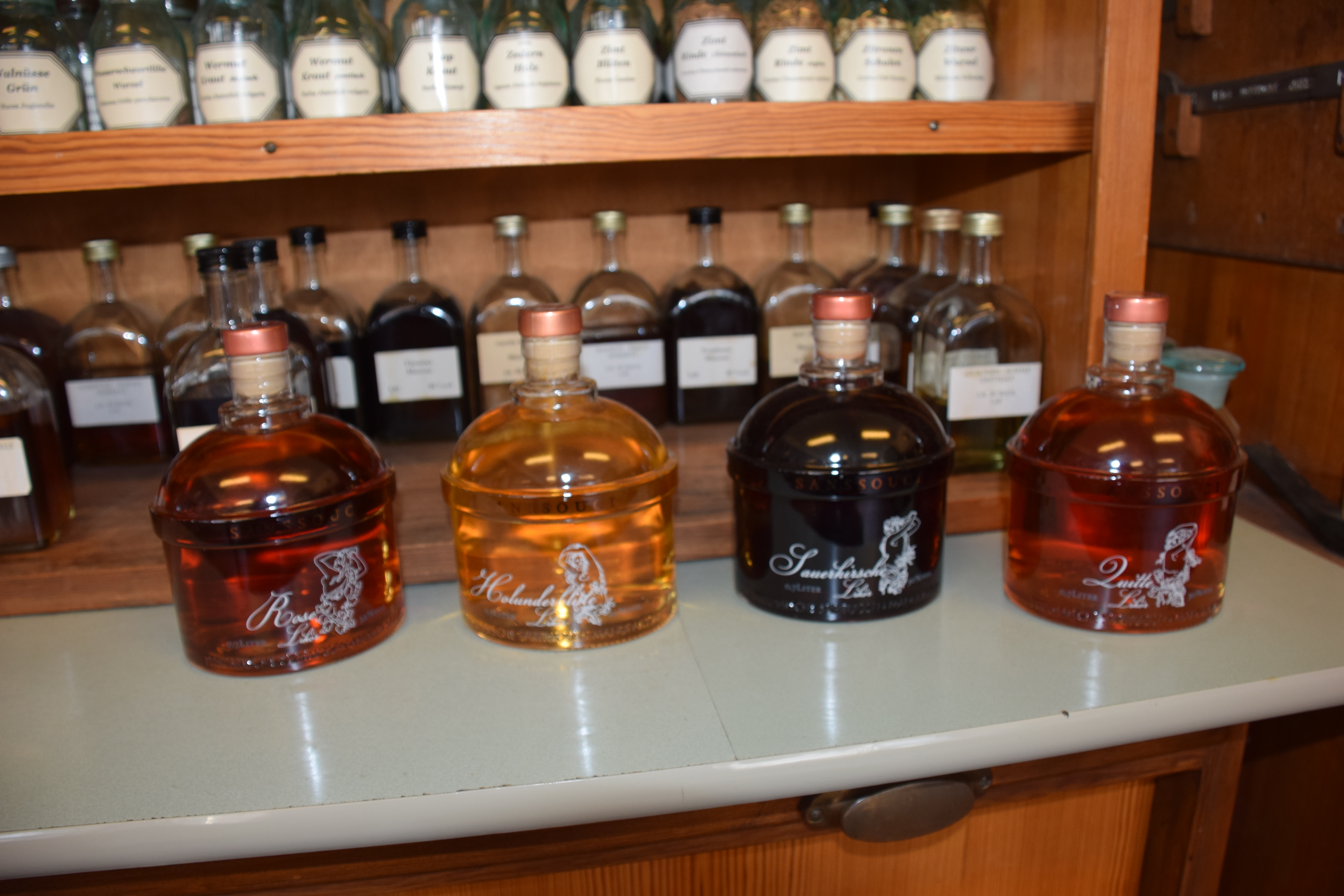 Sanssouci-Liköre